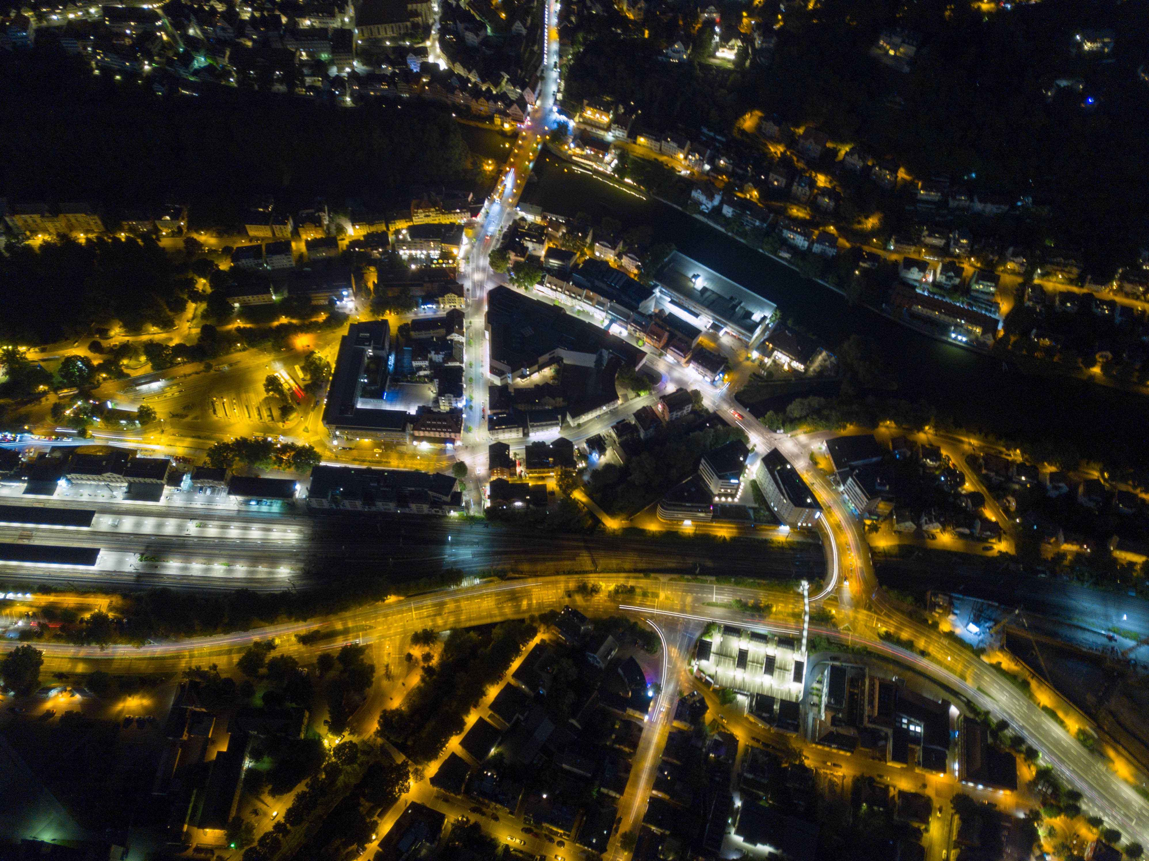 Tübingen bei Nacht